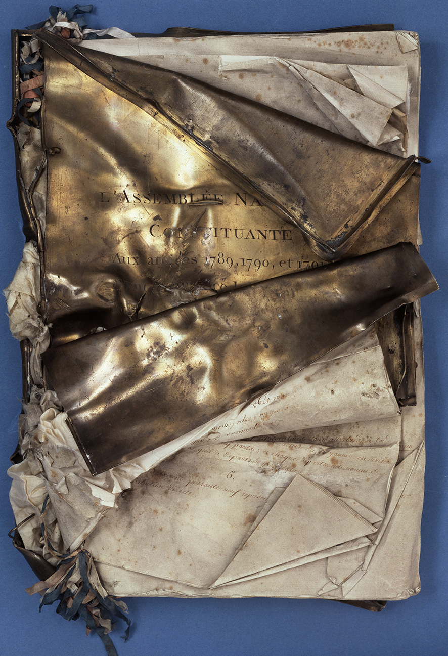 Constitution du 3 septembre 1791, brisée le 5 mai 1793. Ce document qui accompagnait la Déclaration de 1789 fut détruit par le mouton national, sorte de marteau-pilon, après la fin de la monarchie constitutionnelle